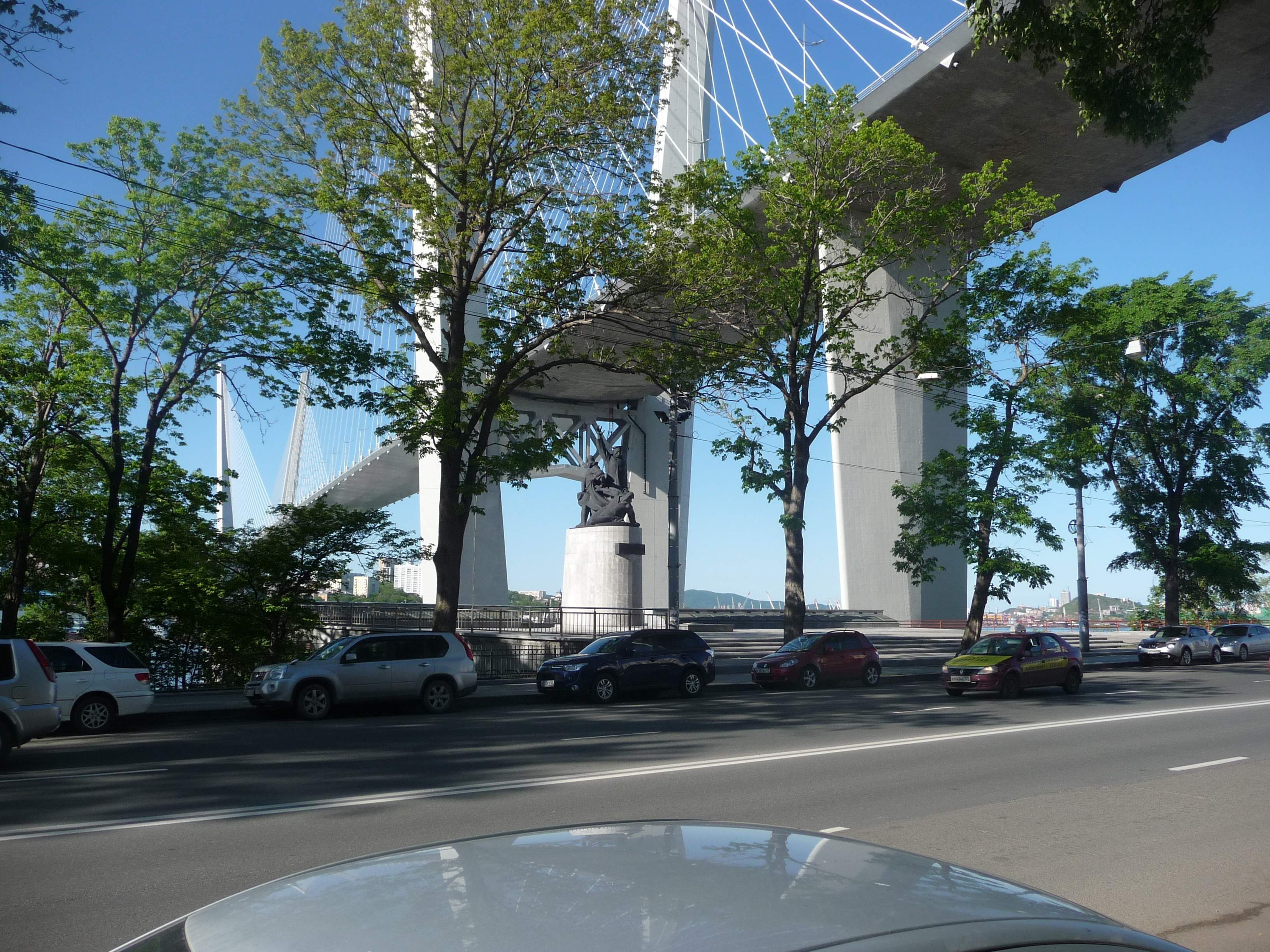 Золотой мост над улицей Сетланской, Владивосток, 2015-06-04